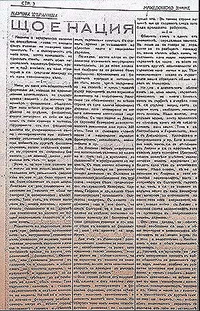 Статия на Васил Ивановски във вестник „Македонско знаме“.